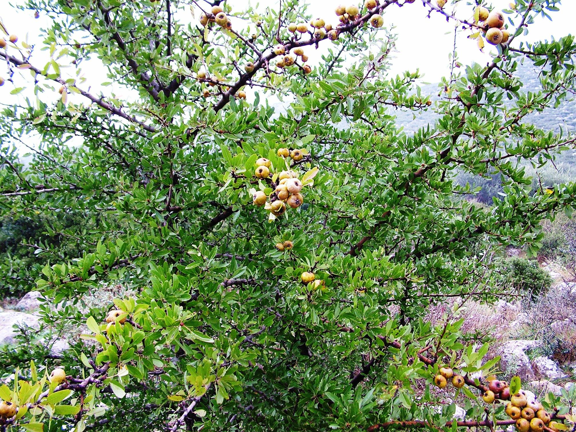 Pyrus amygdaliformis!